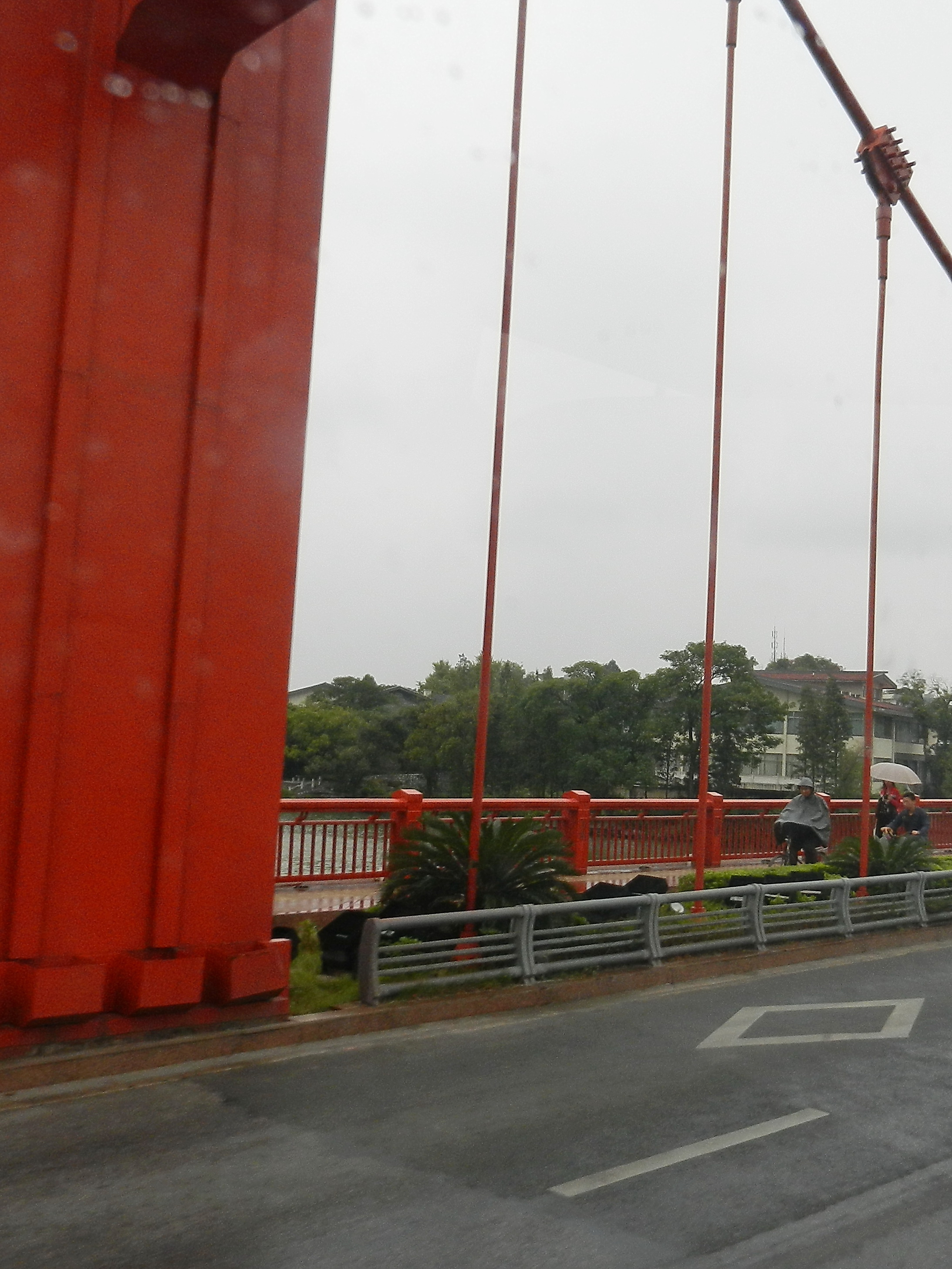 麗澤橋 Lize Bridge